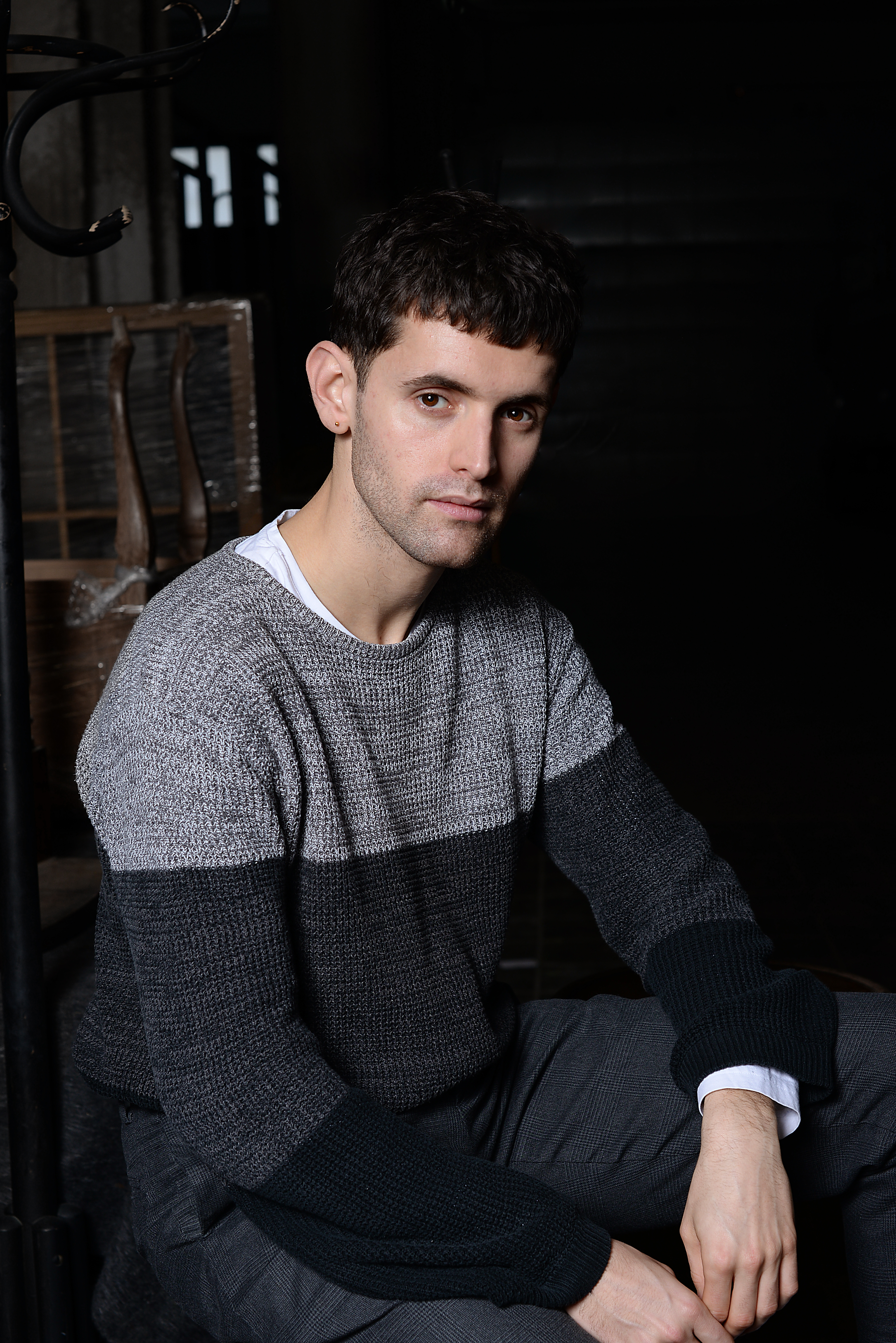 Iñaki Mur